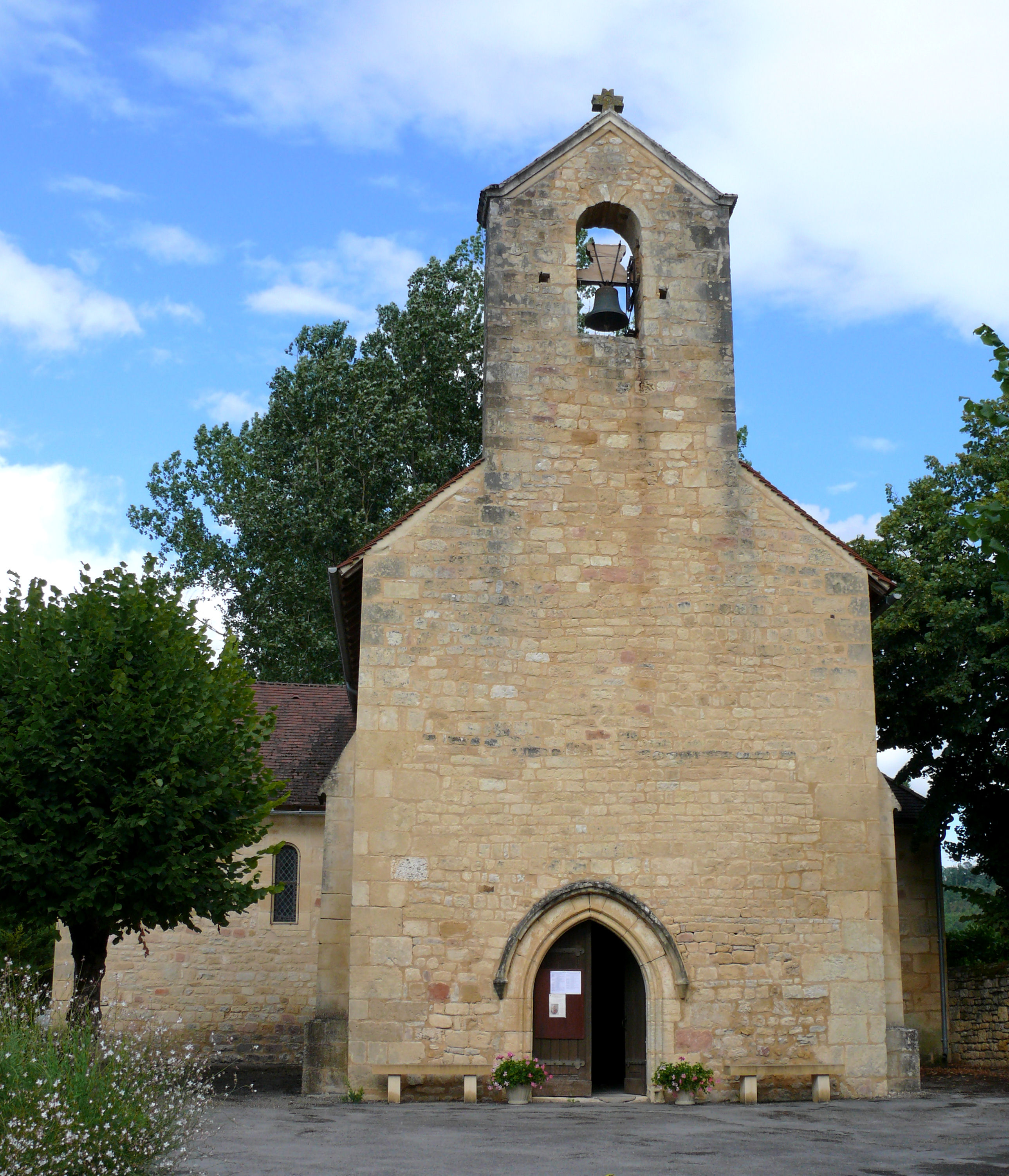 Saint-Cybranet - Eglise